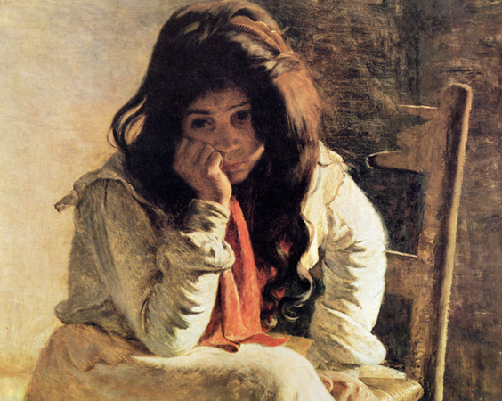 figura de una mujer de pueblo